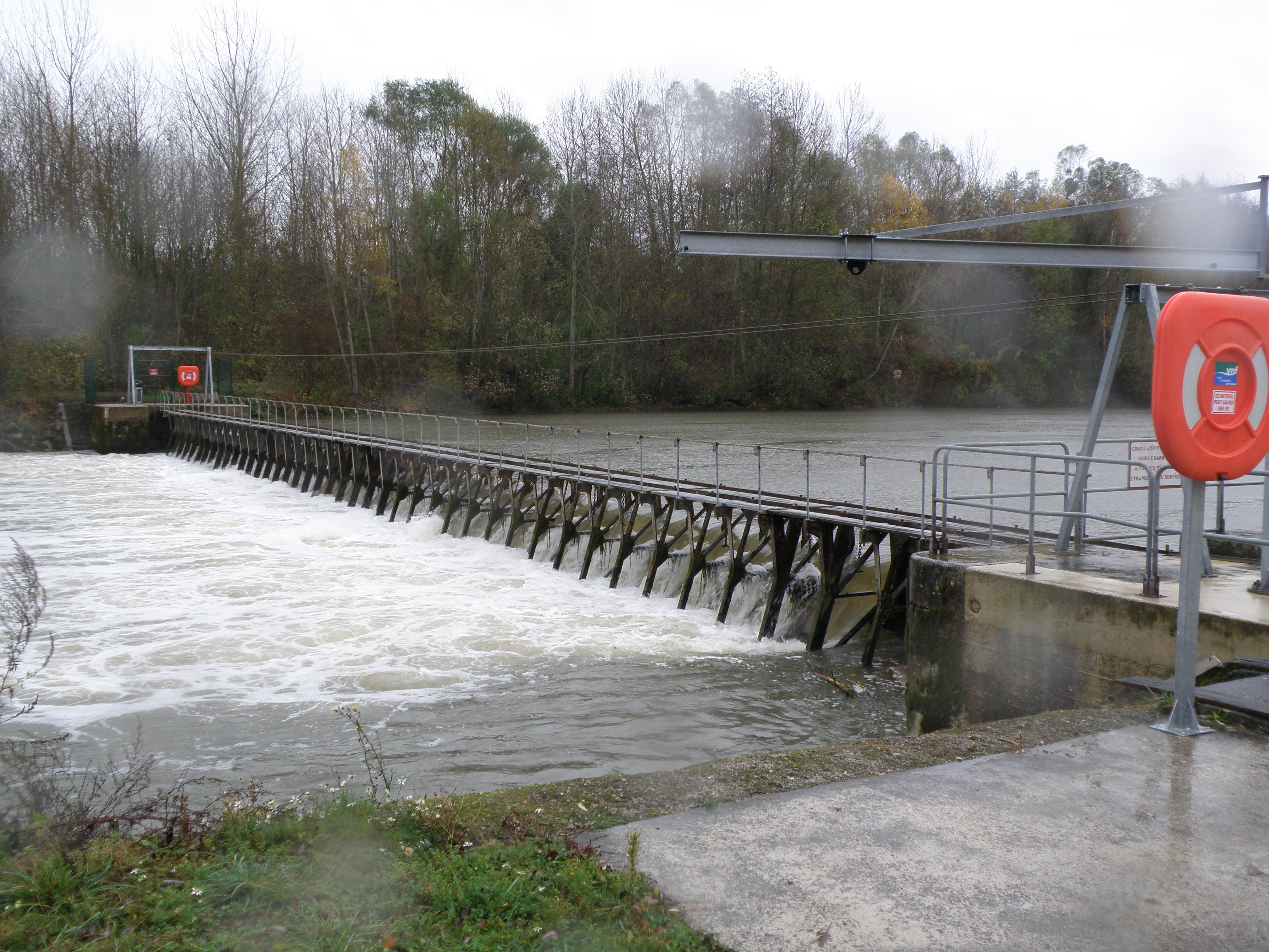 Barrage mobile sur la Petite-Seine. 51260 Conflans-sur-Seine.